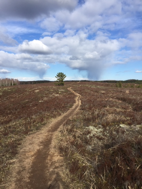 loodusrada